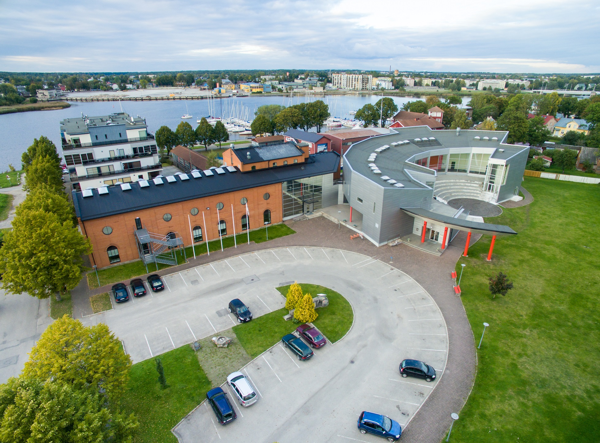 1999. aastal valmis kolledži uue hoone 1. osa ning 2001. valmis kolledži 2. osa ehk raamatukogu.